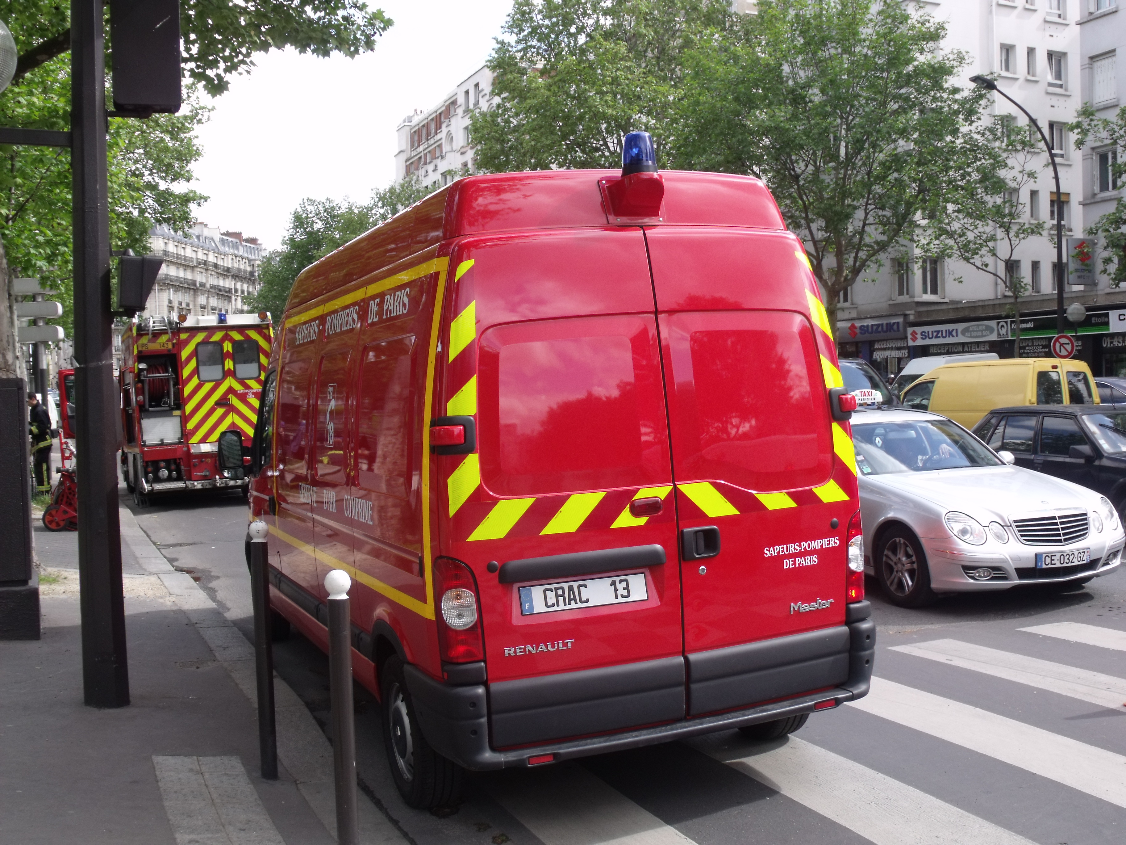 CRAC13 des pompiers de Paris.